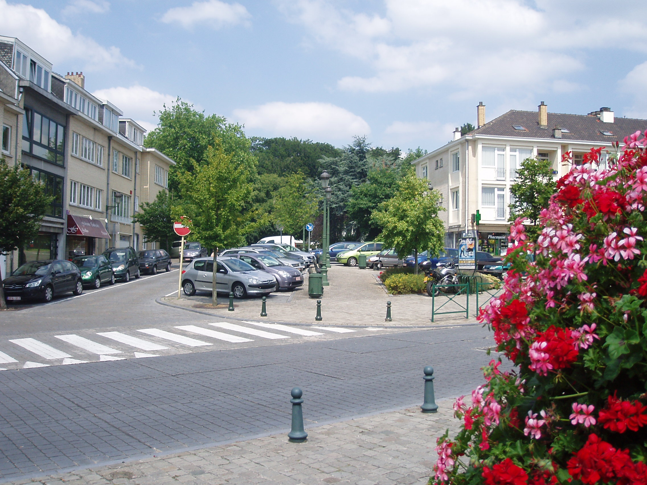 avenue Roger Hainaut Auderghem Belgium